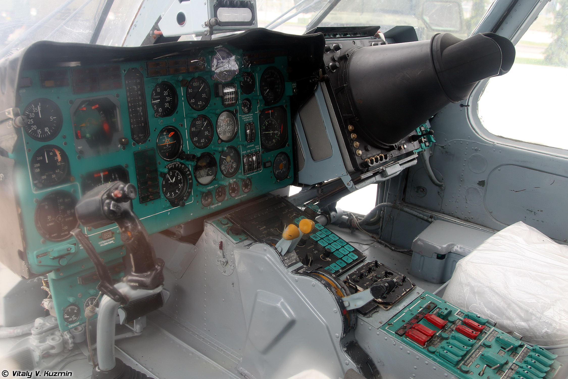 Ка-27ПЛ (Ka-27PL)